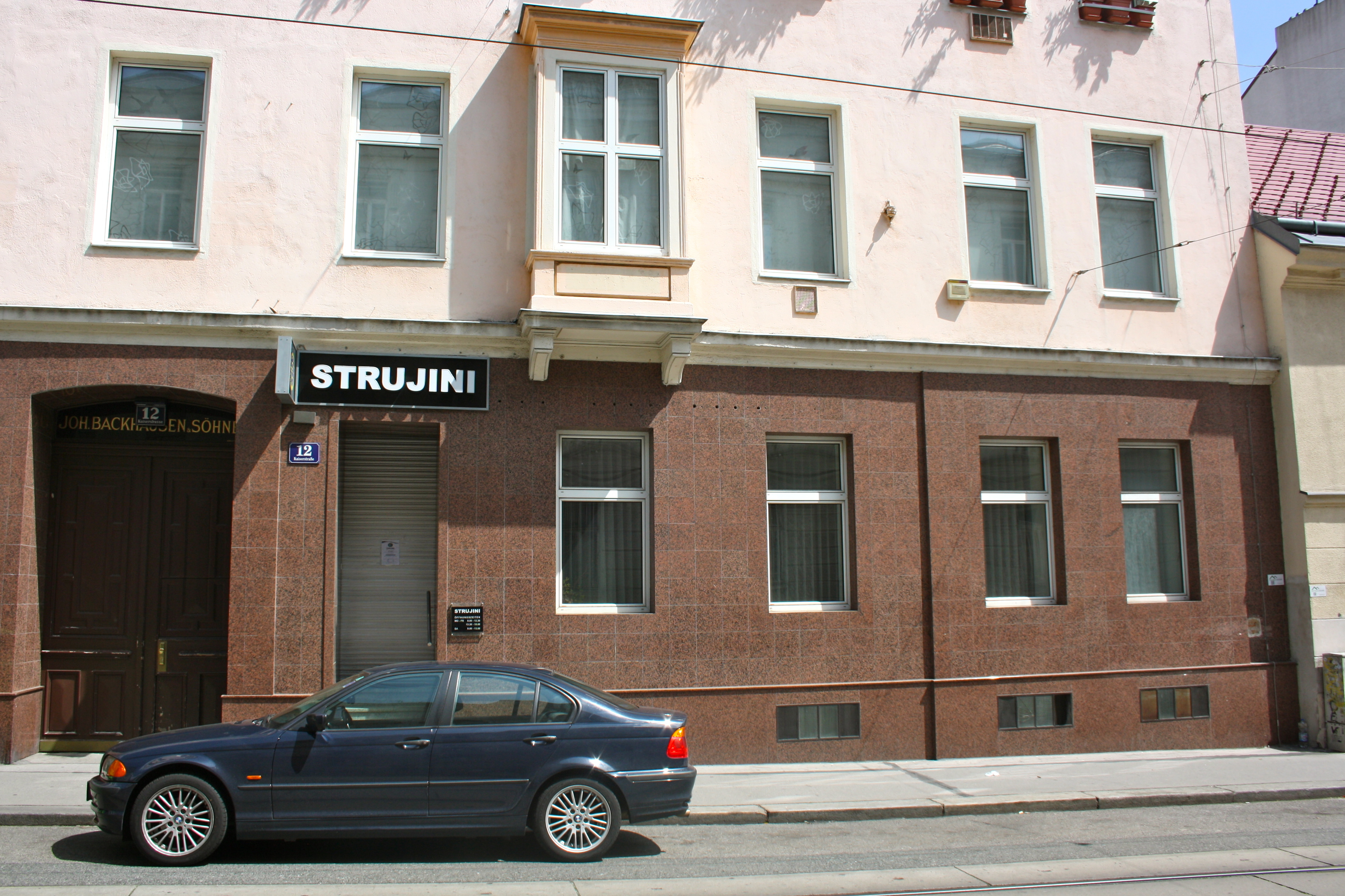 Wohn- und Geschäftshaus Kaiserstraße 12, Wien-Neubau.